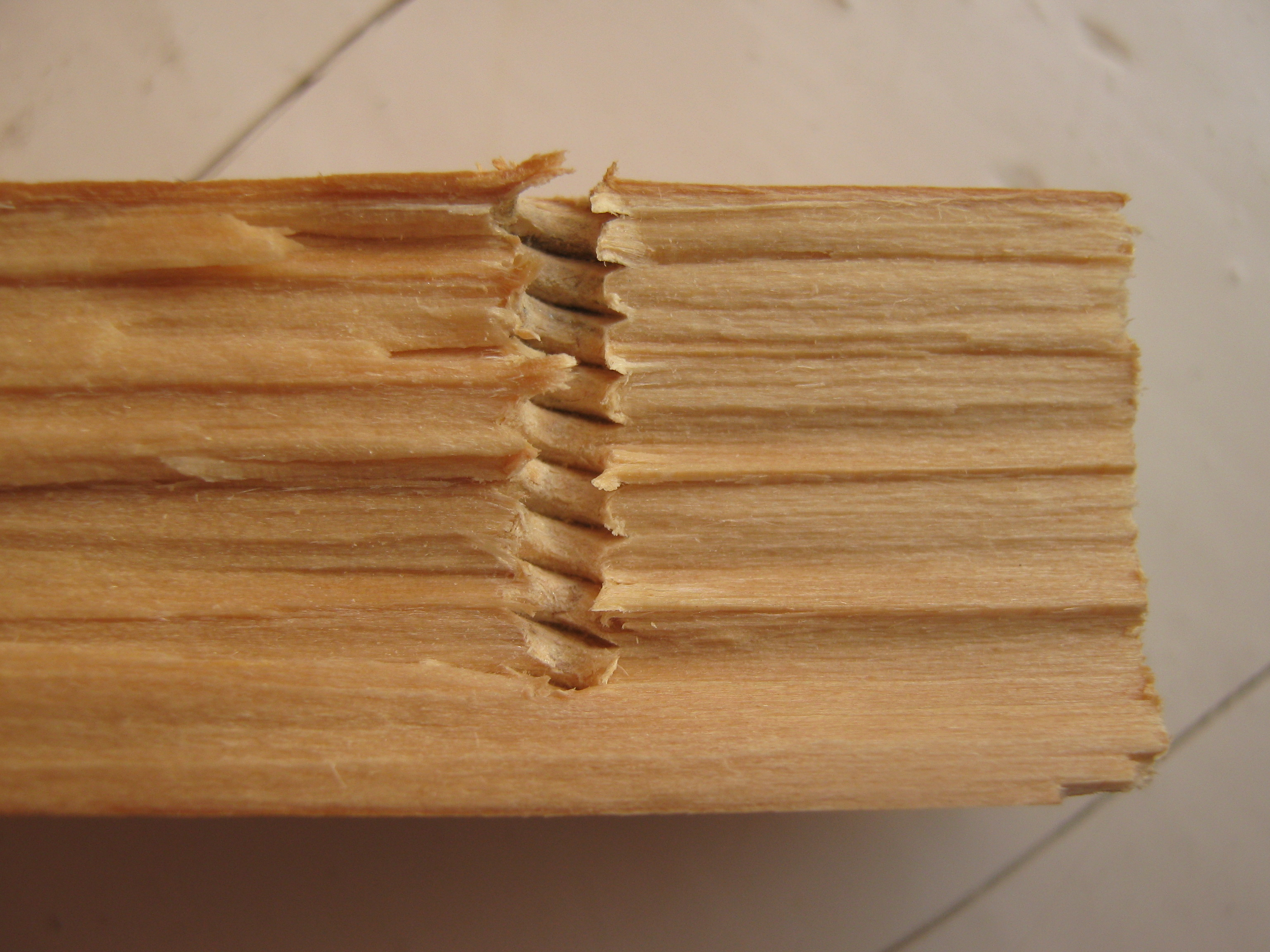 Резьба в древесине, проделанная саморезом.